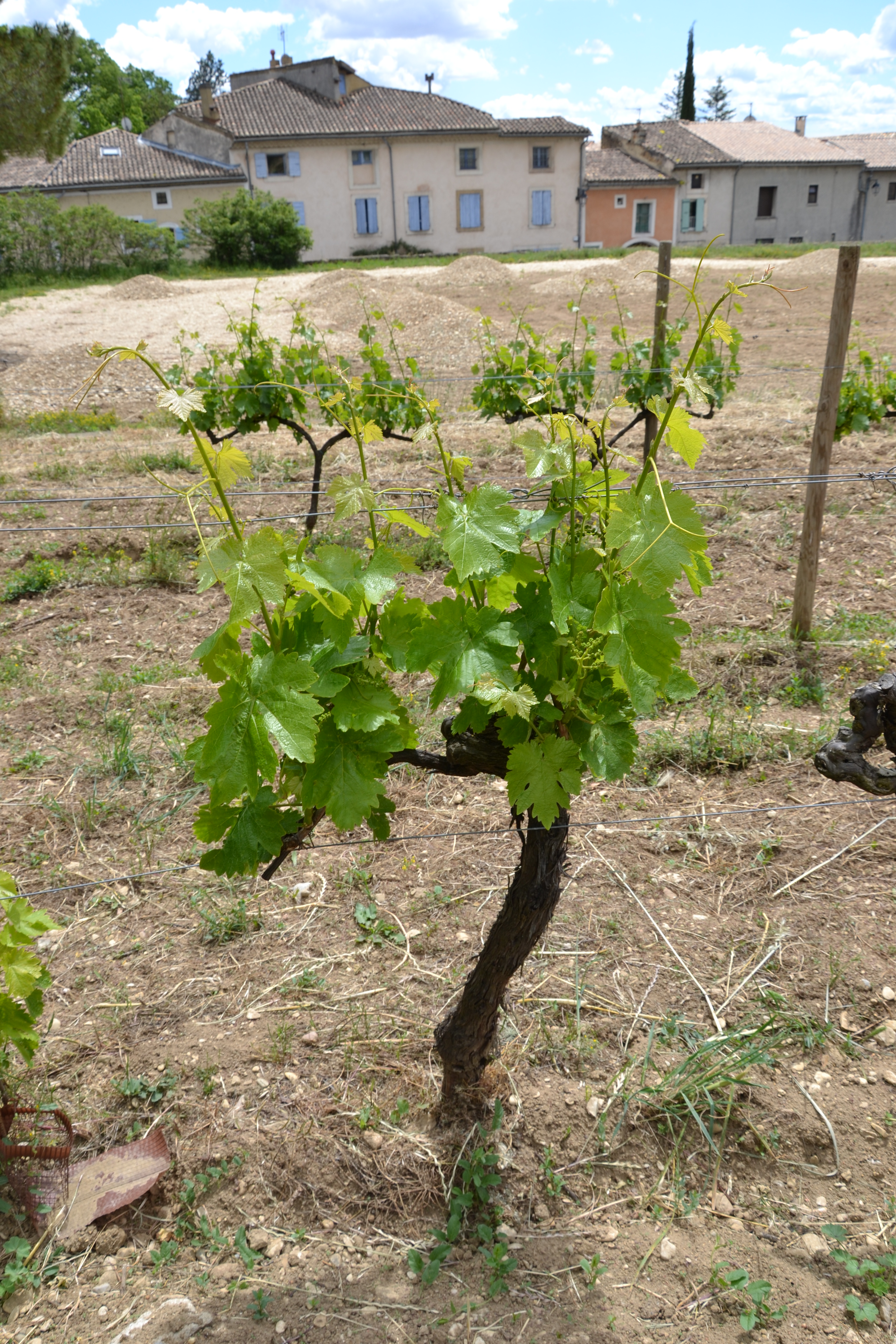 cep de cépage Rhoditis